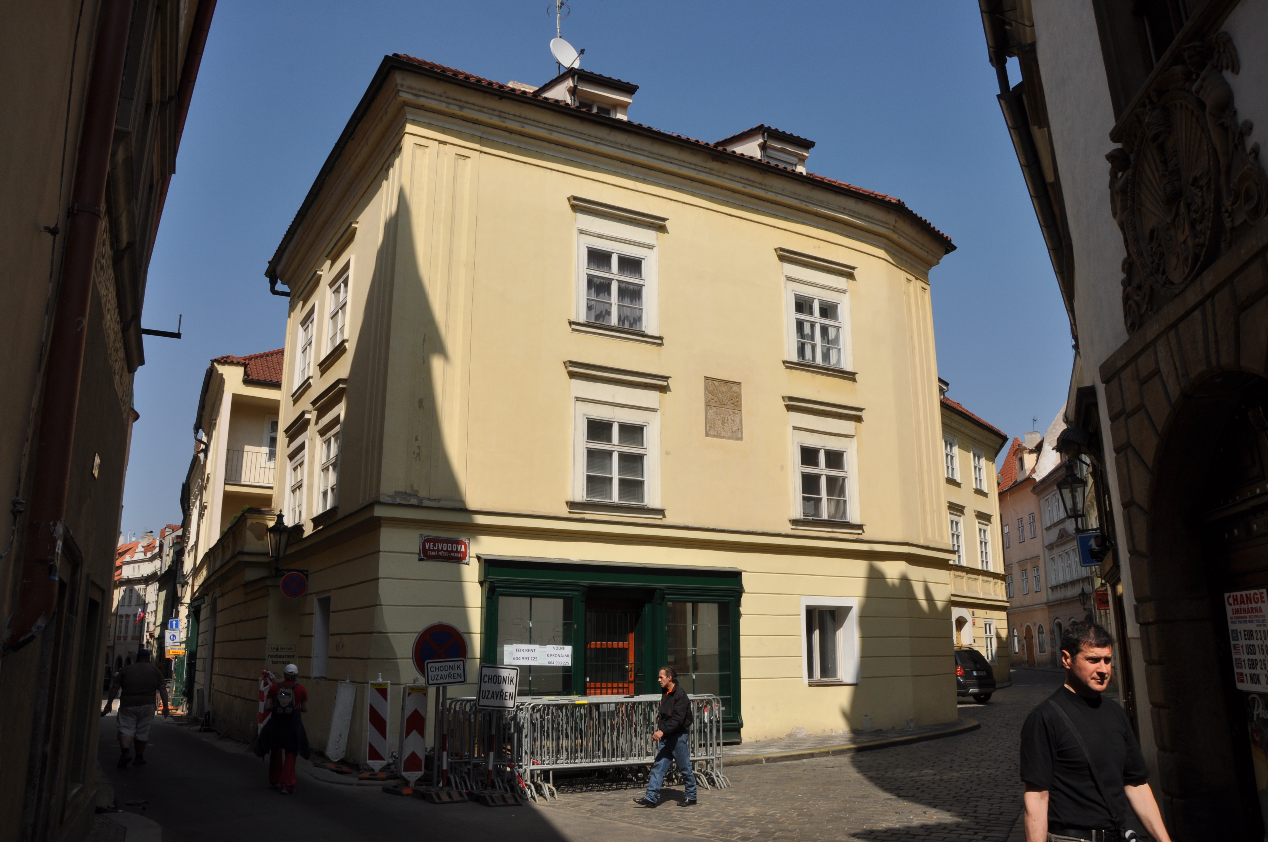 Praha 1-Staré Město, Jilská 445/6, Vejvodova 445/1, Míčovna, Benedovský dům.